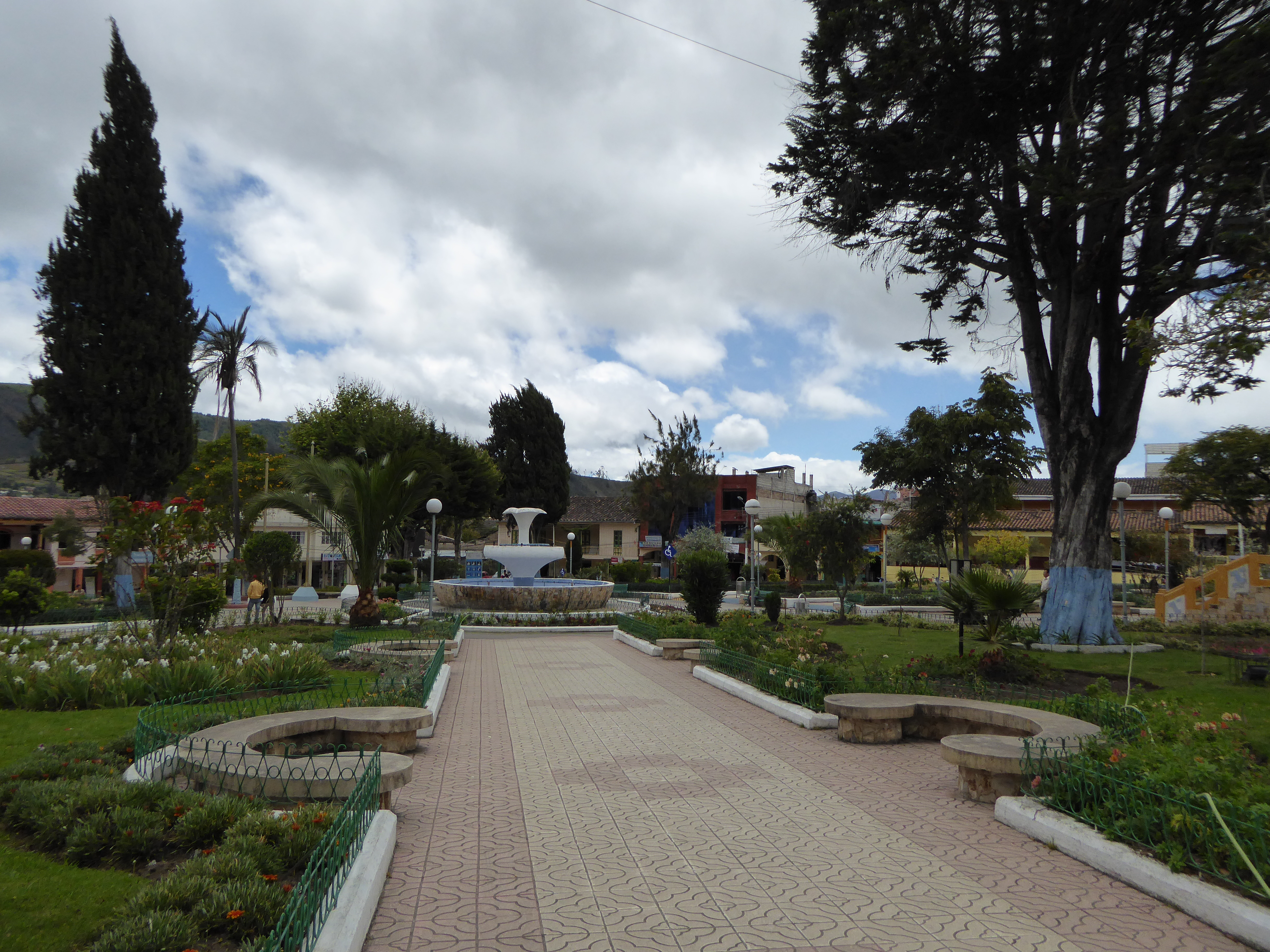 Zentrale Plaza in Saraguro